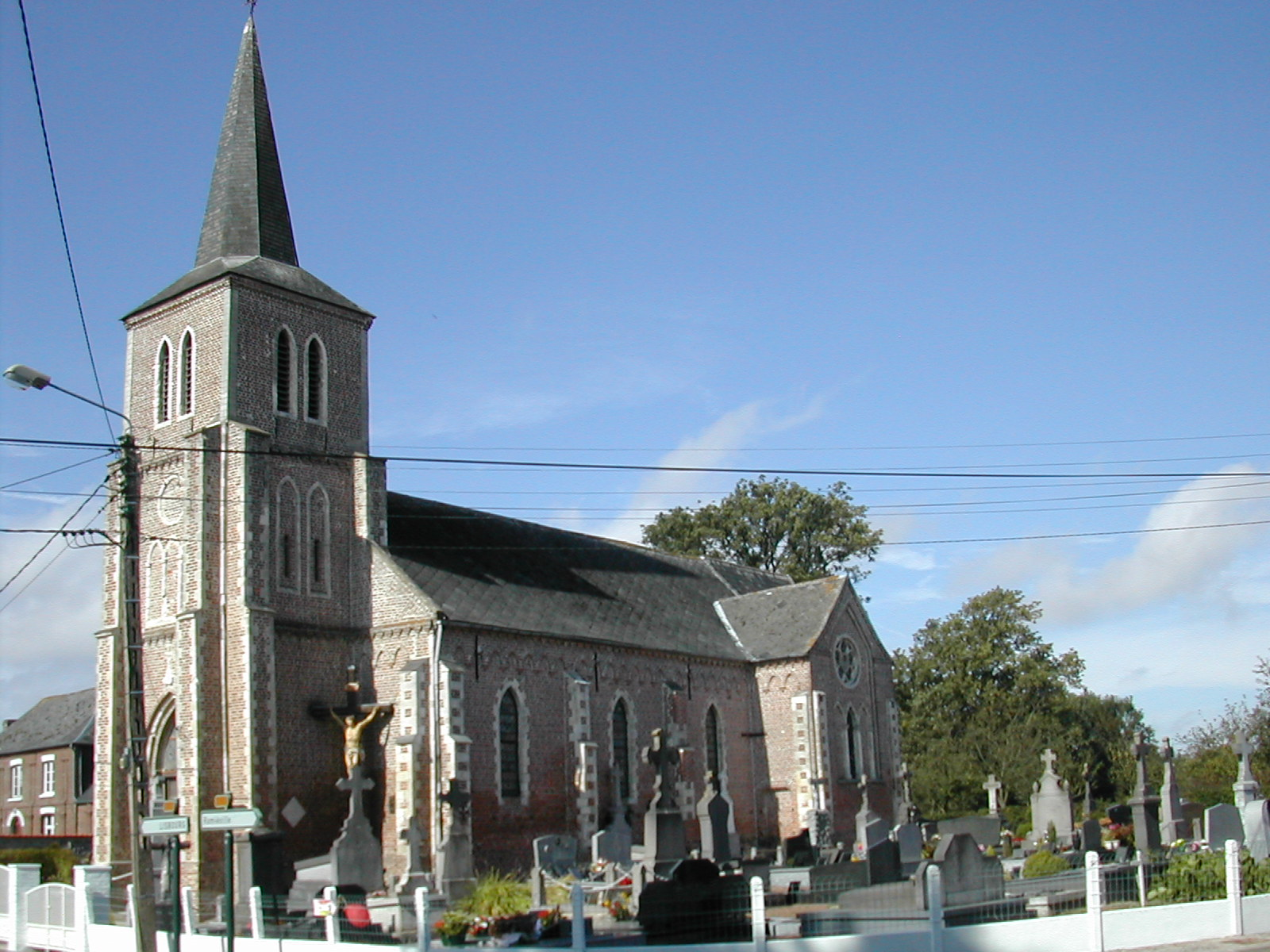 L'église de Prédefin.